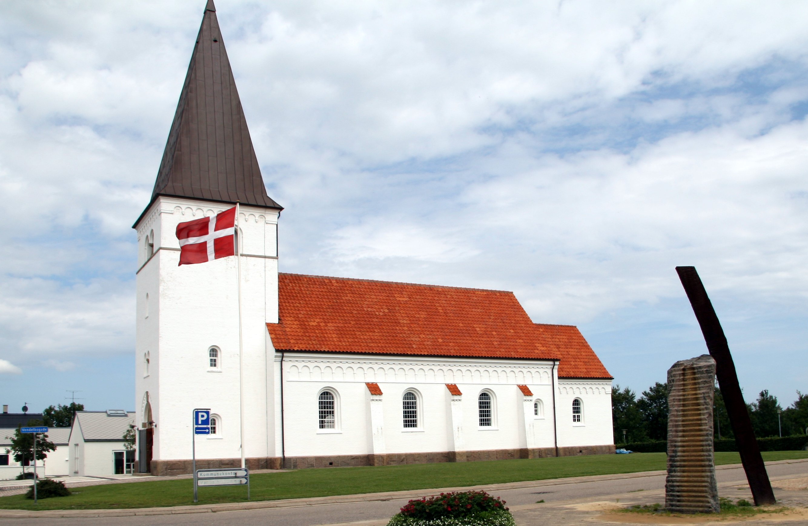 Sindal Bykirke (tidl. Sindal Stationskirke)